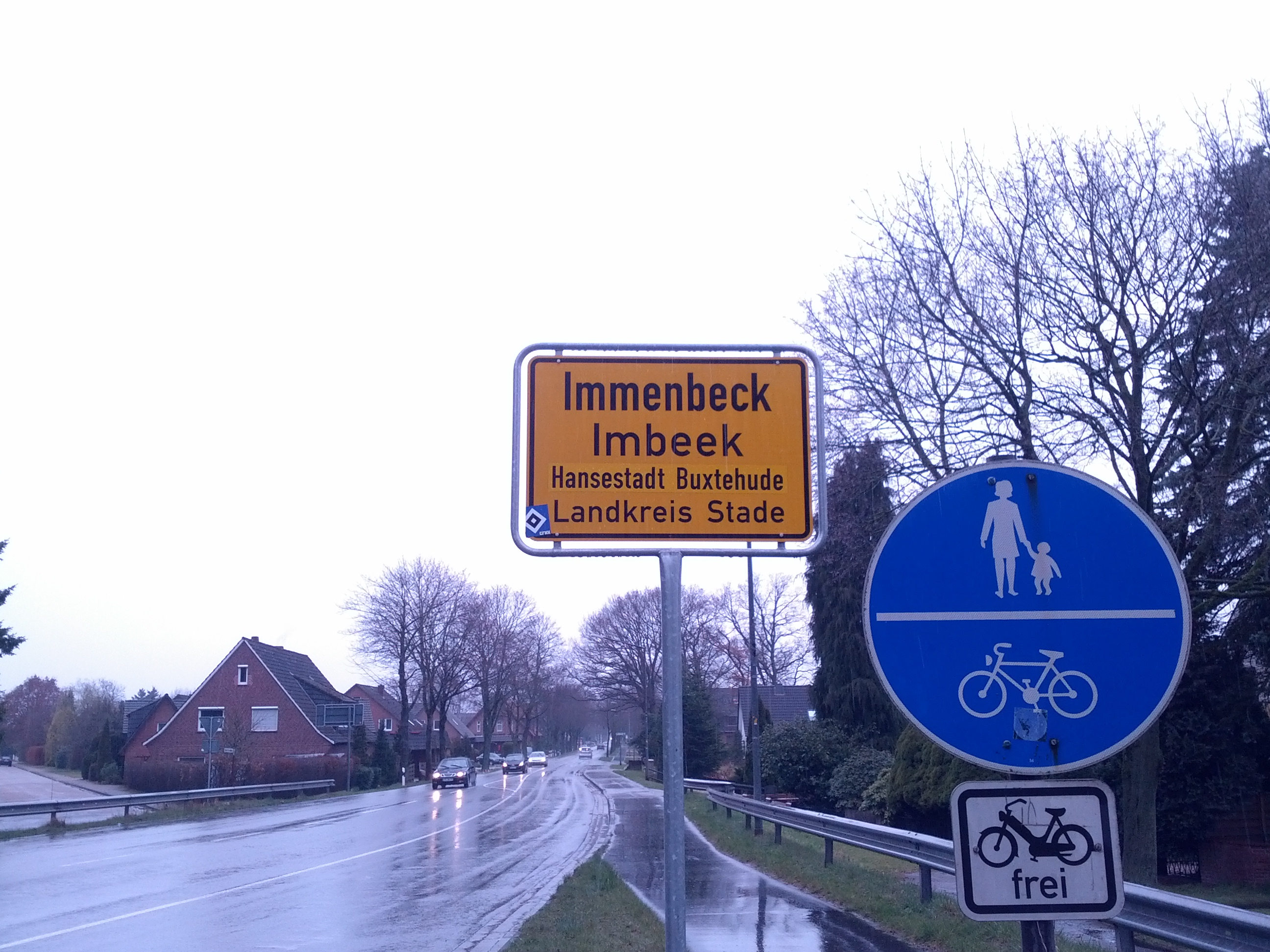 Oortsschild mit den Naam op Hoochdüütsch un op Plattdüütsch